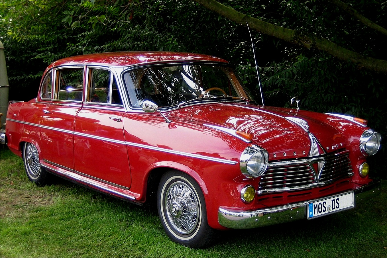 Borgward Hansa 2400, Baujahr 1958, beim Borgward-Treffen in Andernach 2005